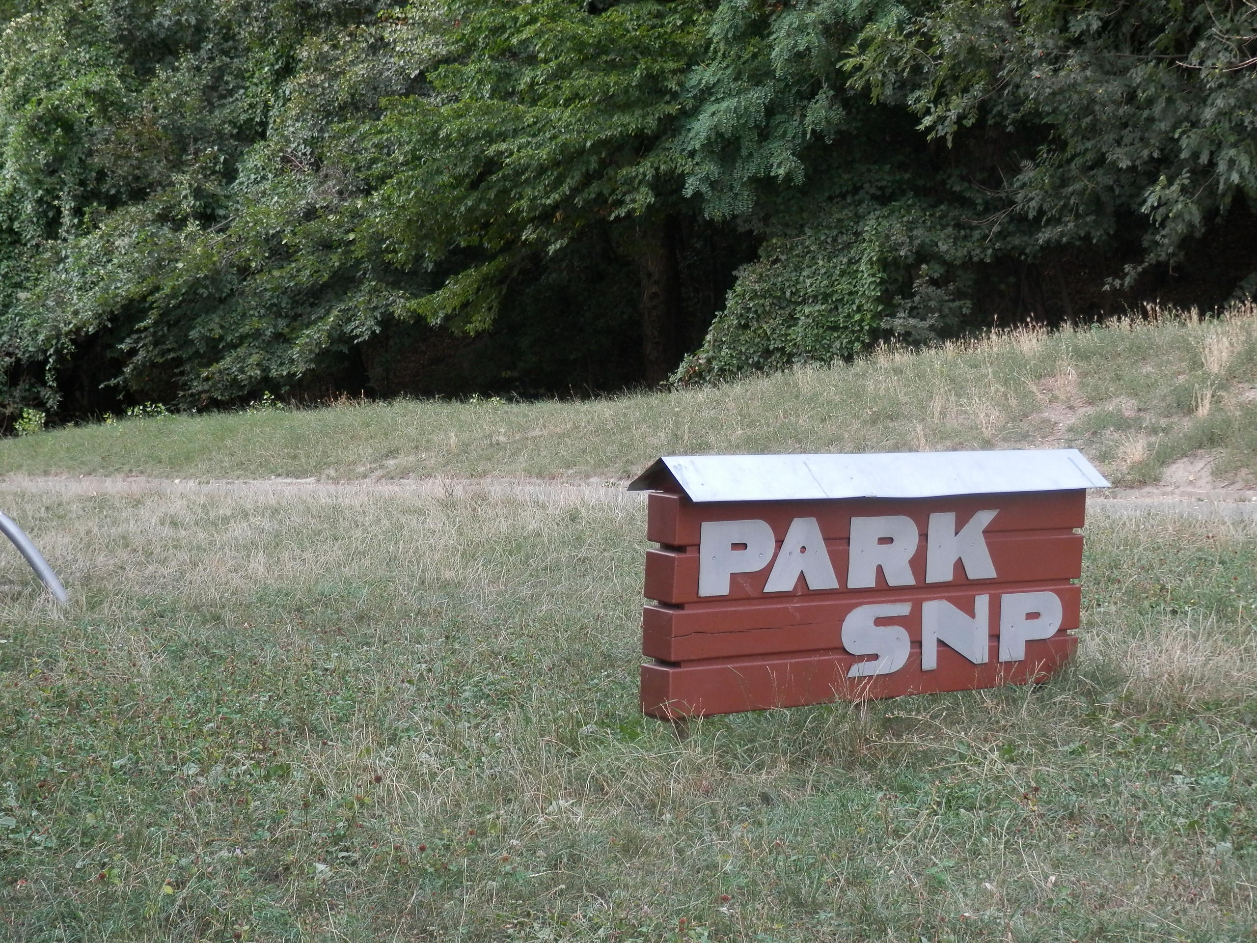 Parka SNP v Líščom údolí. Bratislava